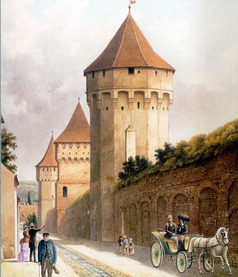 Str. Cetatii